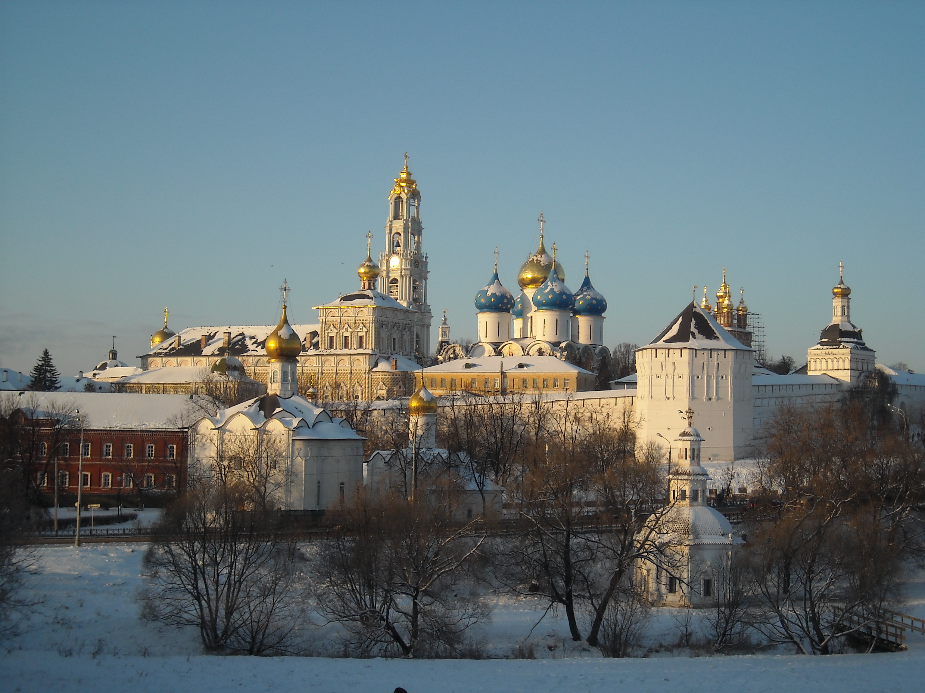 Вид со смотровой площадки на Сергиевской улице